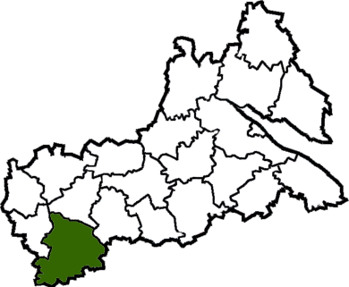 Umanskyi-Raion map